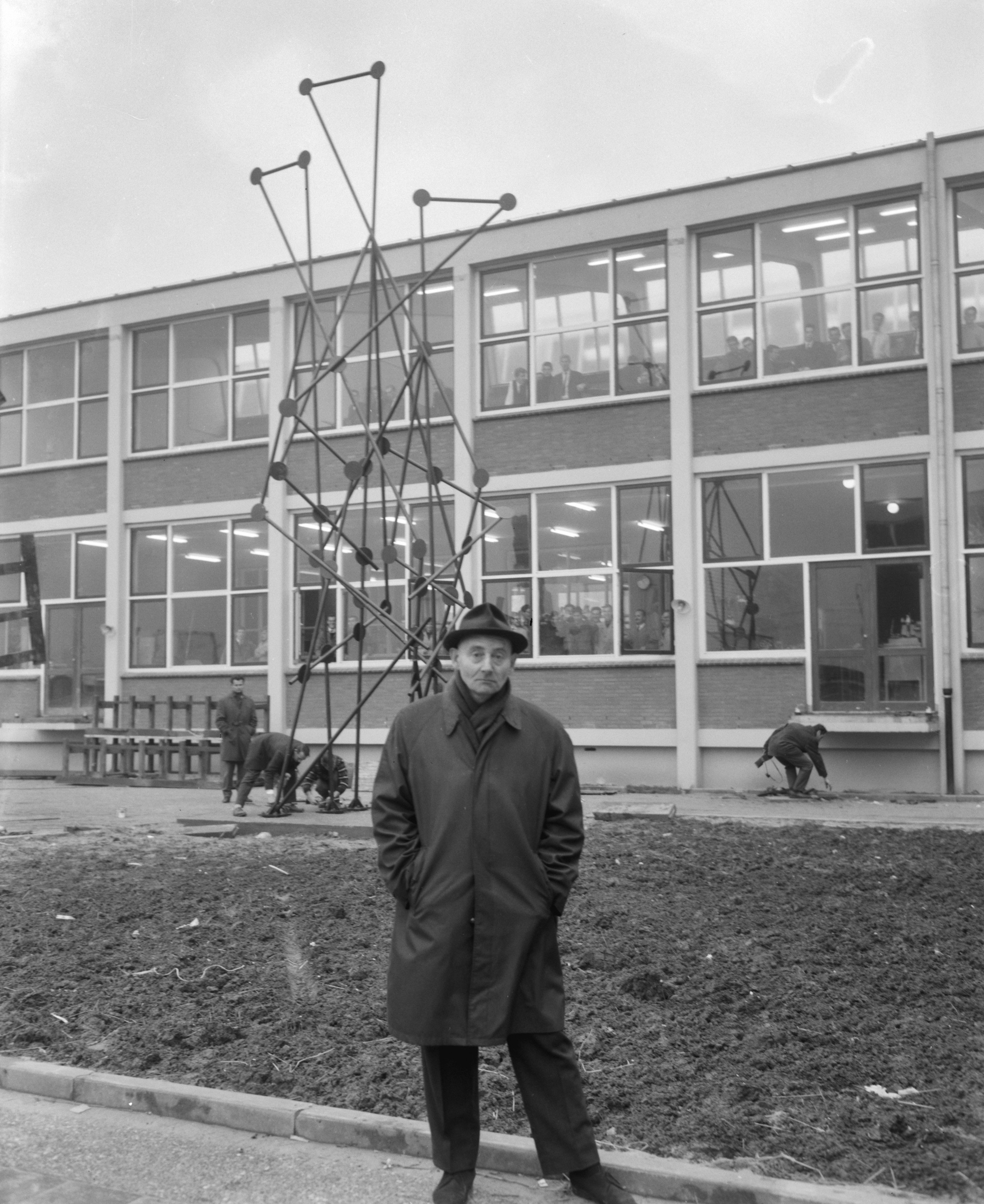 Collectie / Archief : Fotocollectie Anefo Reportage / Serie : [ onbekend ] Beschrijving : Plastiek van Cees Timmer geplaatst op voorplein van ETS aan de Spaklerweg te Amsterdam Datum : 23 november 1964 Locatie : Amsterdam, Noord-Holland Trefwoorden : beelden Persoonsnaam : Cees Timmer Fotograaf : Bilsen, Joop van / Anefo Auteursrechthebbende : Nationaal Archief Materiaalsoort : Negatief (zwart/wit) Nummer archiefinventaris : bekijk toegang 2.24.01.04 Bestanddeelnummer : 917-1601 Reacties Geplaatst door Maaike op 19 januari 2014 - 17:52. Cornelis Timmer (Cees) ook wel als Kees Timmer geschreven Trefwoorden: kunstenaar, beeldhouwer ETS staat voor Electro-Technische School Locatie: Korte Ouderkerkerdijk 5 (hoek Spaklerweg)